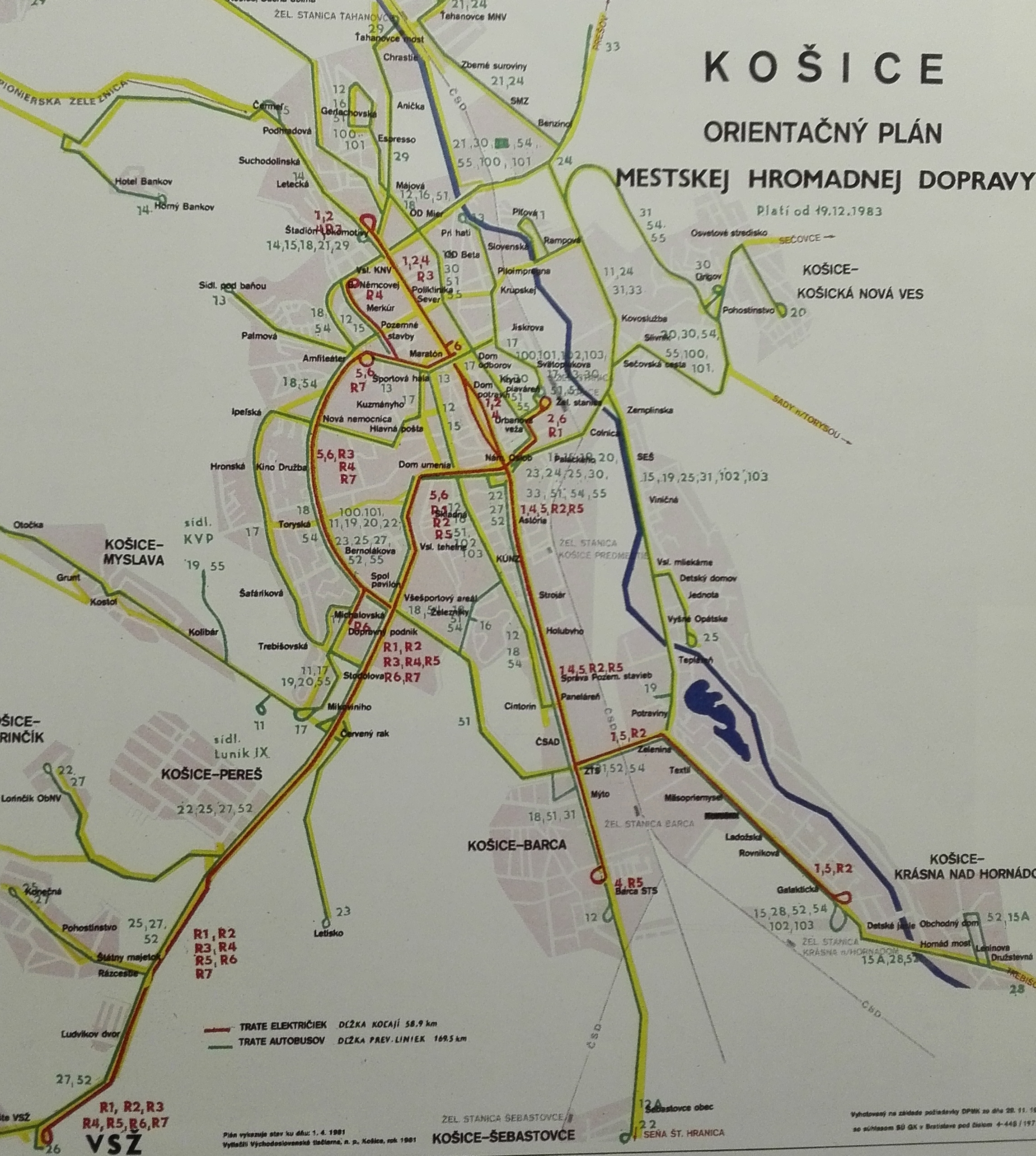 Orientačný plán mestskej hromadnej dopravy v Košiciach, stav k roku 1981, vyhotovené na základe požiadavky DPMK z roku 1977